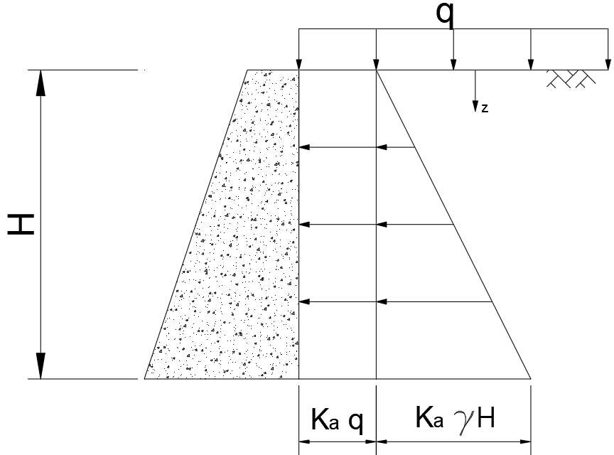 등분포 상재하중이 있을 때 토압